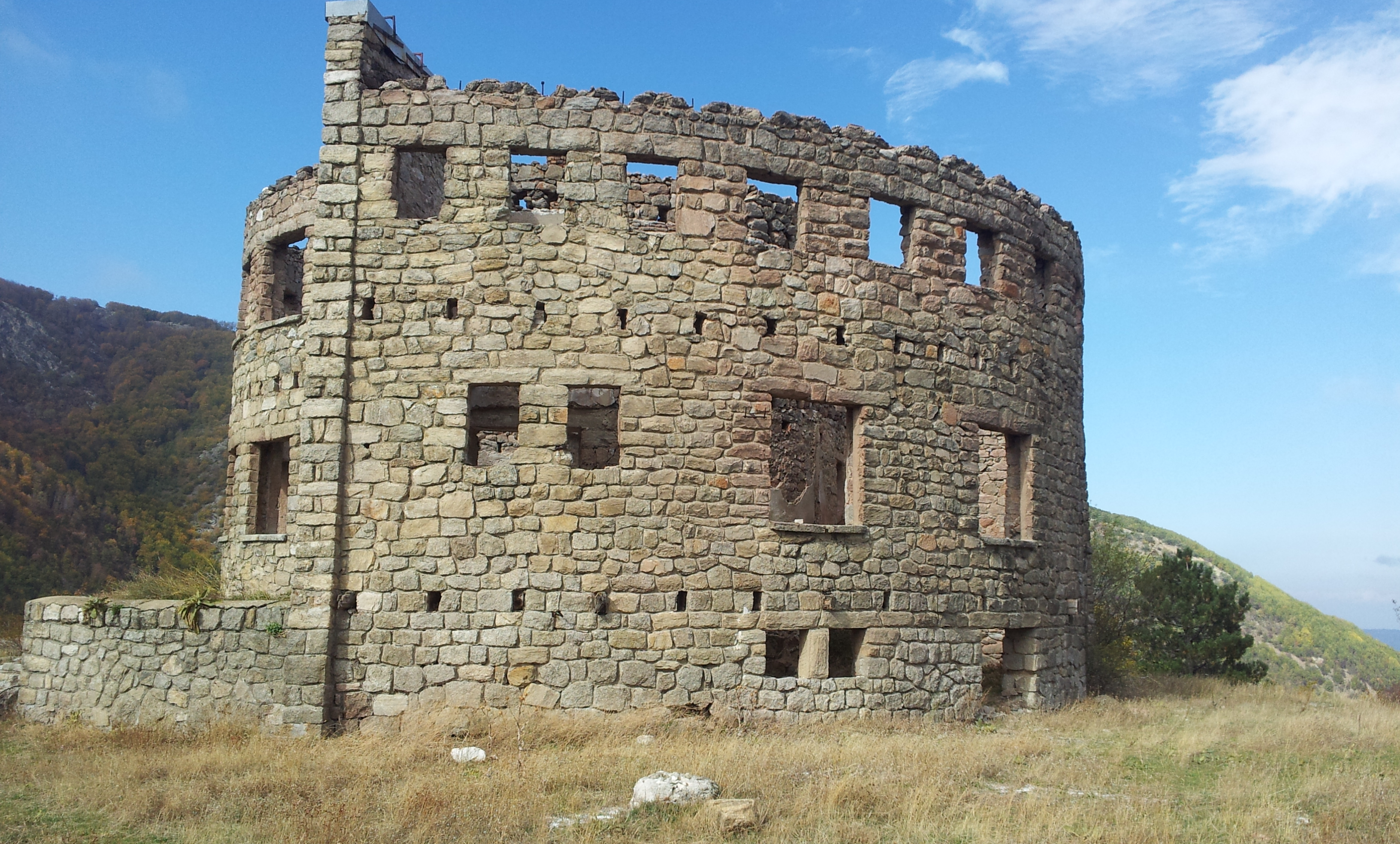 Планинарски дом „Дервен“